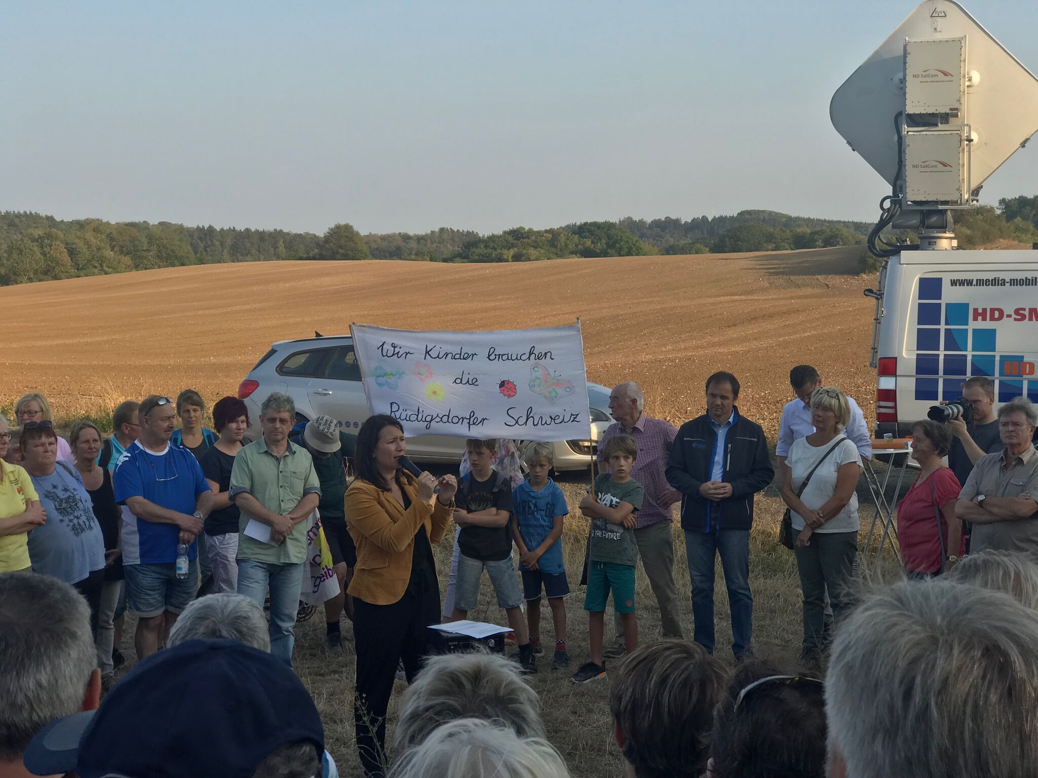 Anja Siegesmund spricht am Kuhberg zu den Teilnehmern der Sternenwanderung durch die Rüdigsdorfer Schweiz